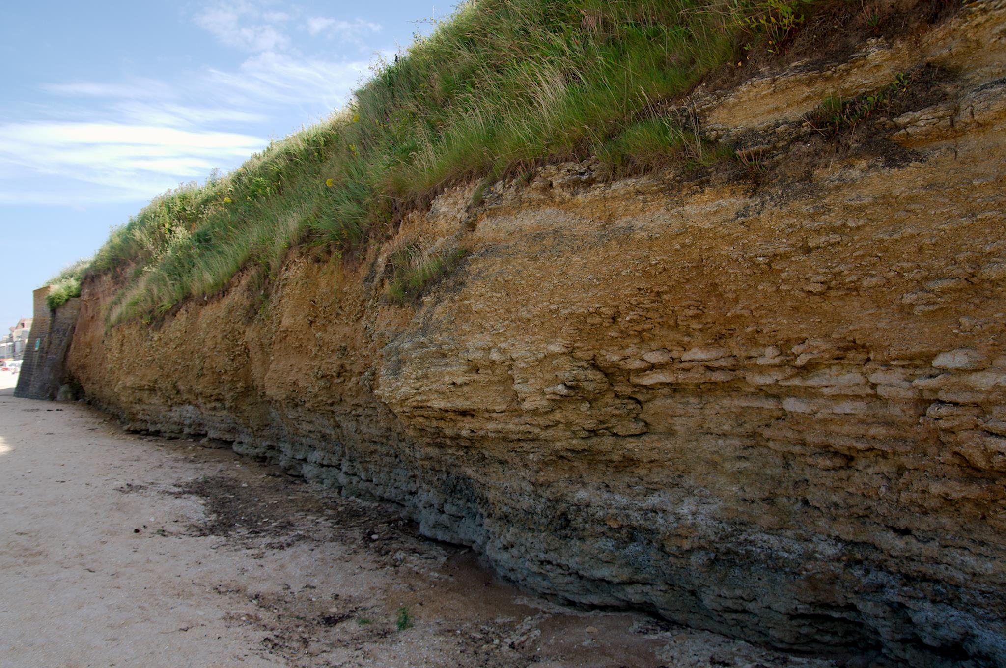 Falaise du Cap Romain à Saint-Aubin-sur-Mer dans le Calvados